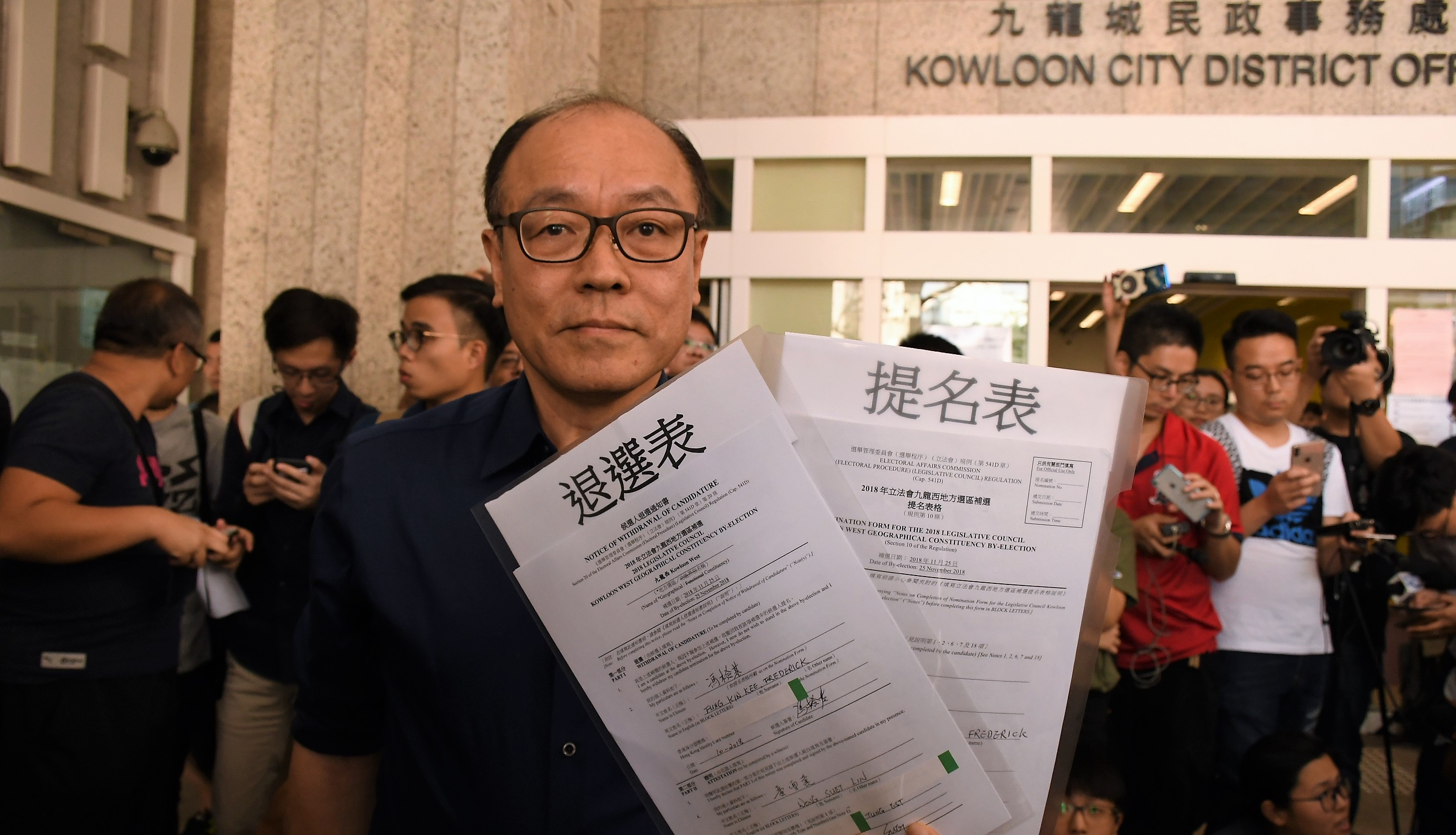 已經退出民協的前立法會議員馮檢基報名參選立法會九龍西補選。(美國之音湯惠芸)